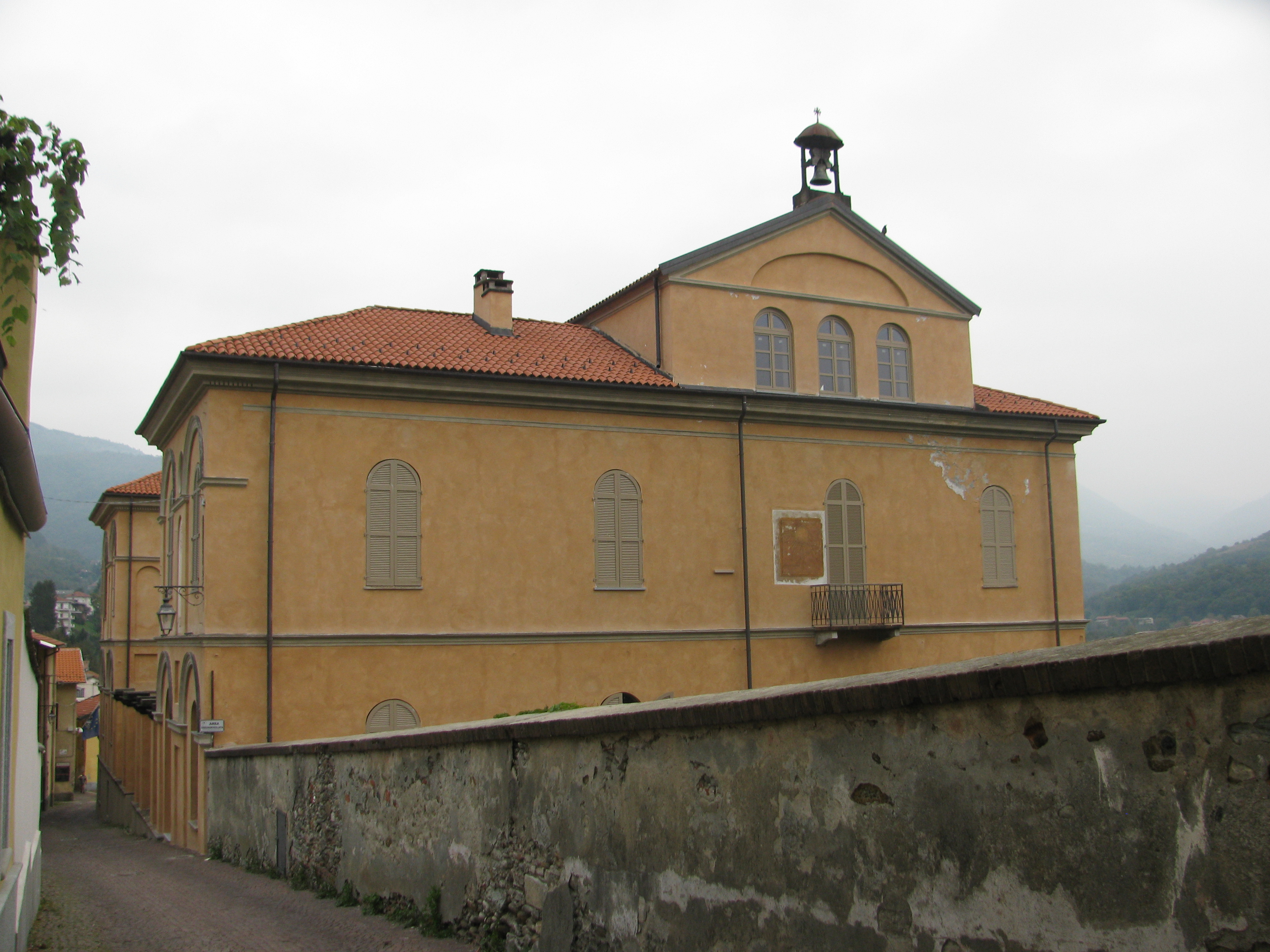 Edificio dell’ex Ospedale Mauriziano This is a photo of a monument which is part of cultural heritage of Italy.